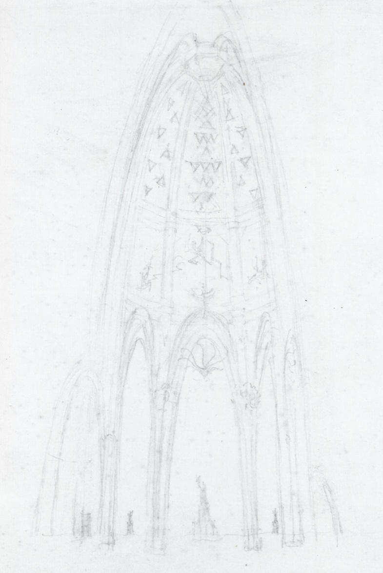 Sala América, Hotel Atracción.